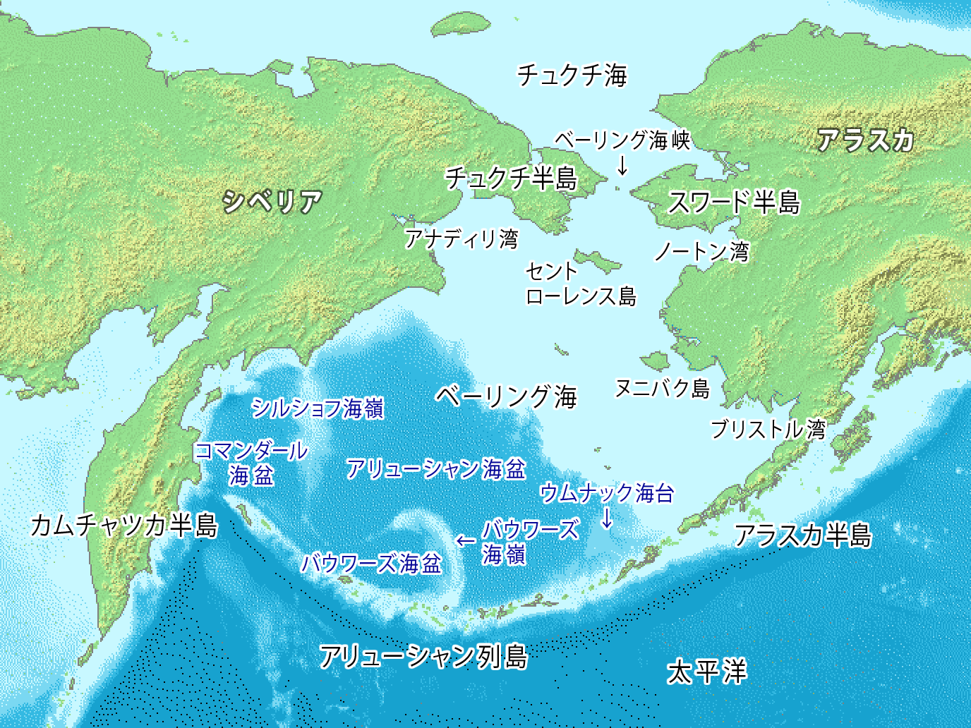 ベーリング海周辺の地図。